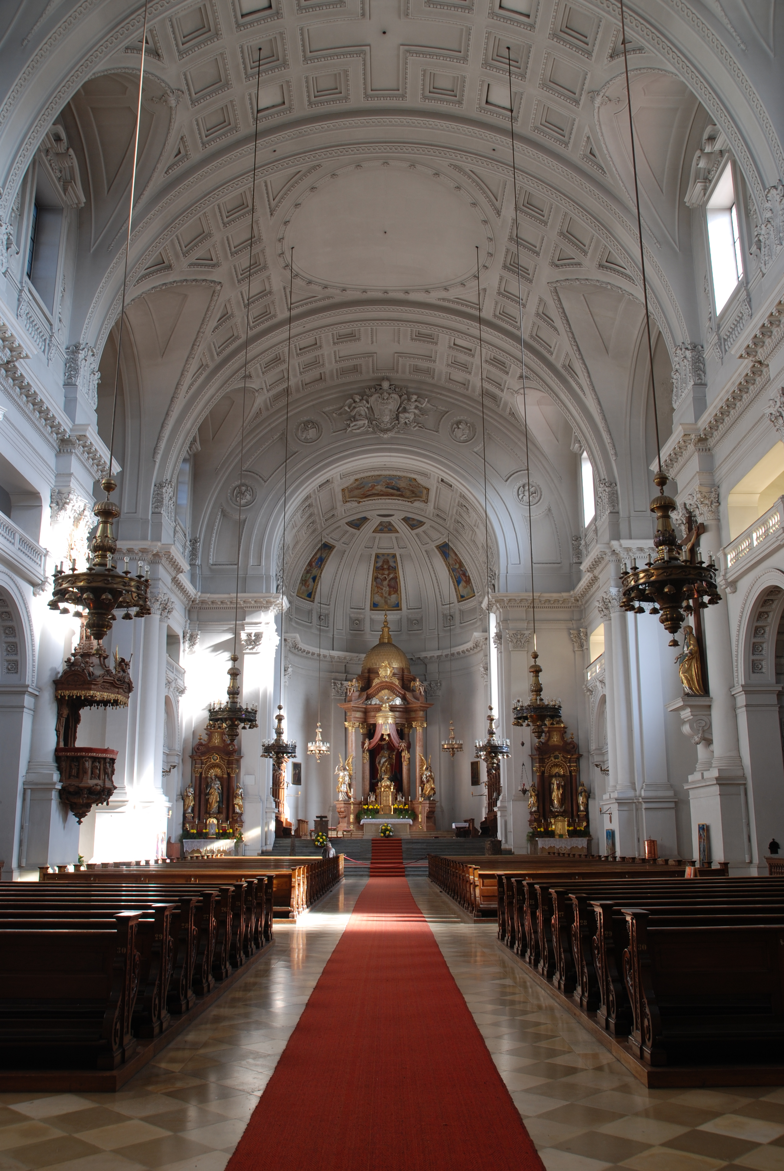 Innenaufnahme der Kirche St. Margaret